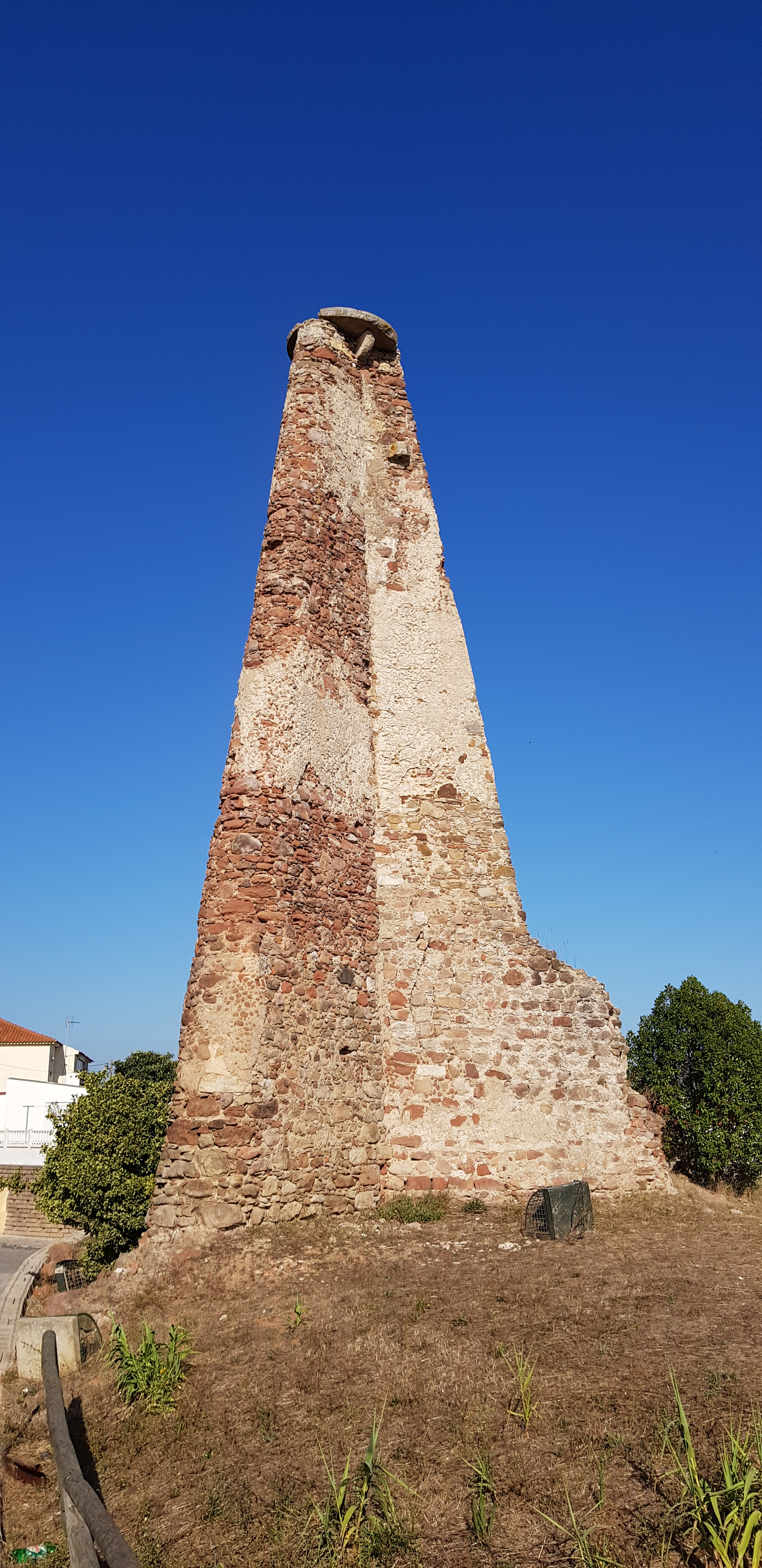 Torre de Redondos (restos) ou Castelo de Redondos - torre em Figueira da Foz, Portugal Cultural property Q66942562, Redondos, Buarcos, Buarcos e São Julião, Figueira da Foz, Coimbra District, Portugal Q66942562, SIPA ID: 1277, DGPC ID: 70908 Wiki Loves Monuments ID: DGPC-70908